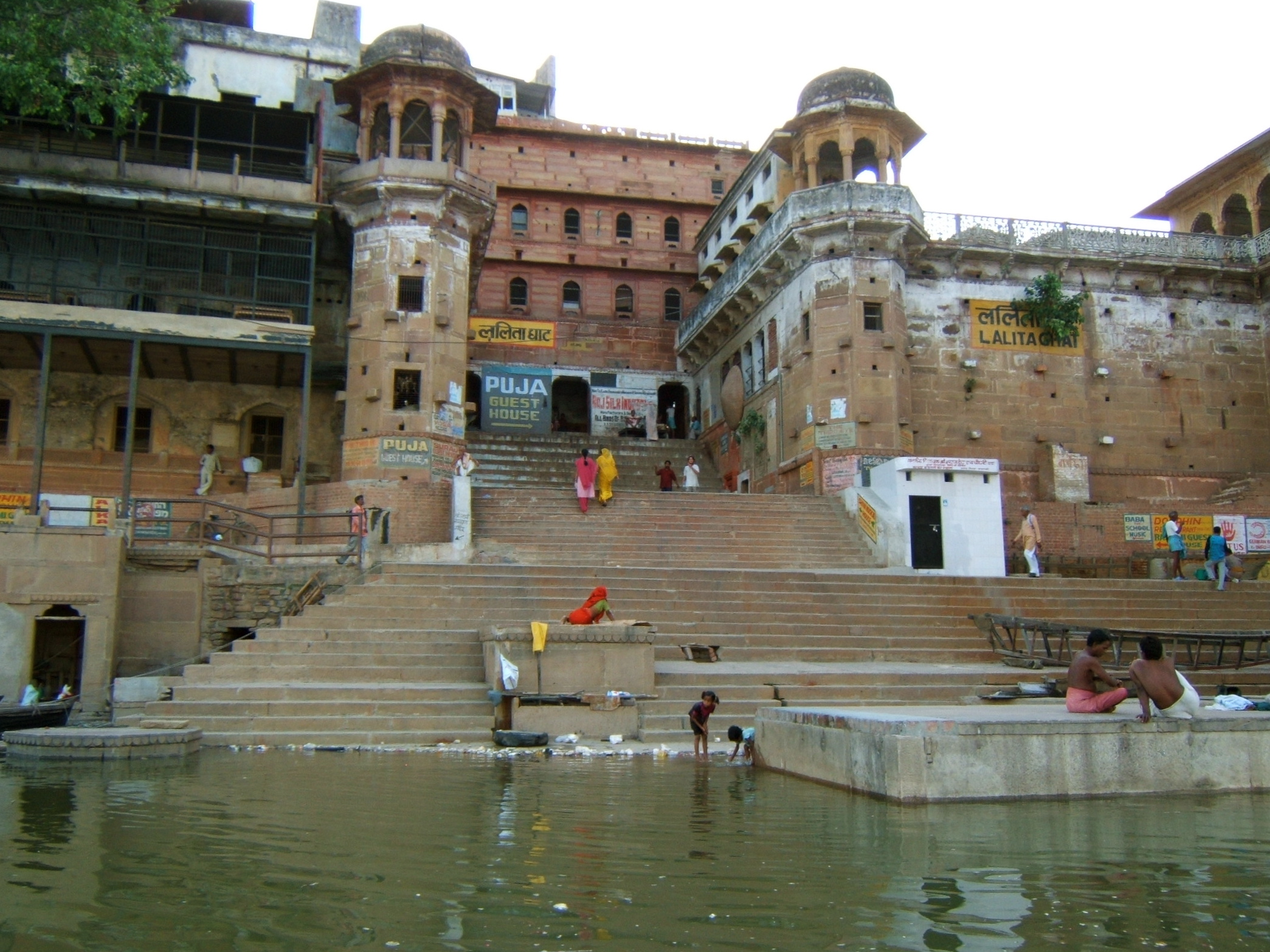 Lalita ghat in Varanasi